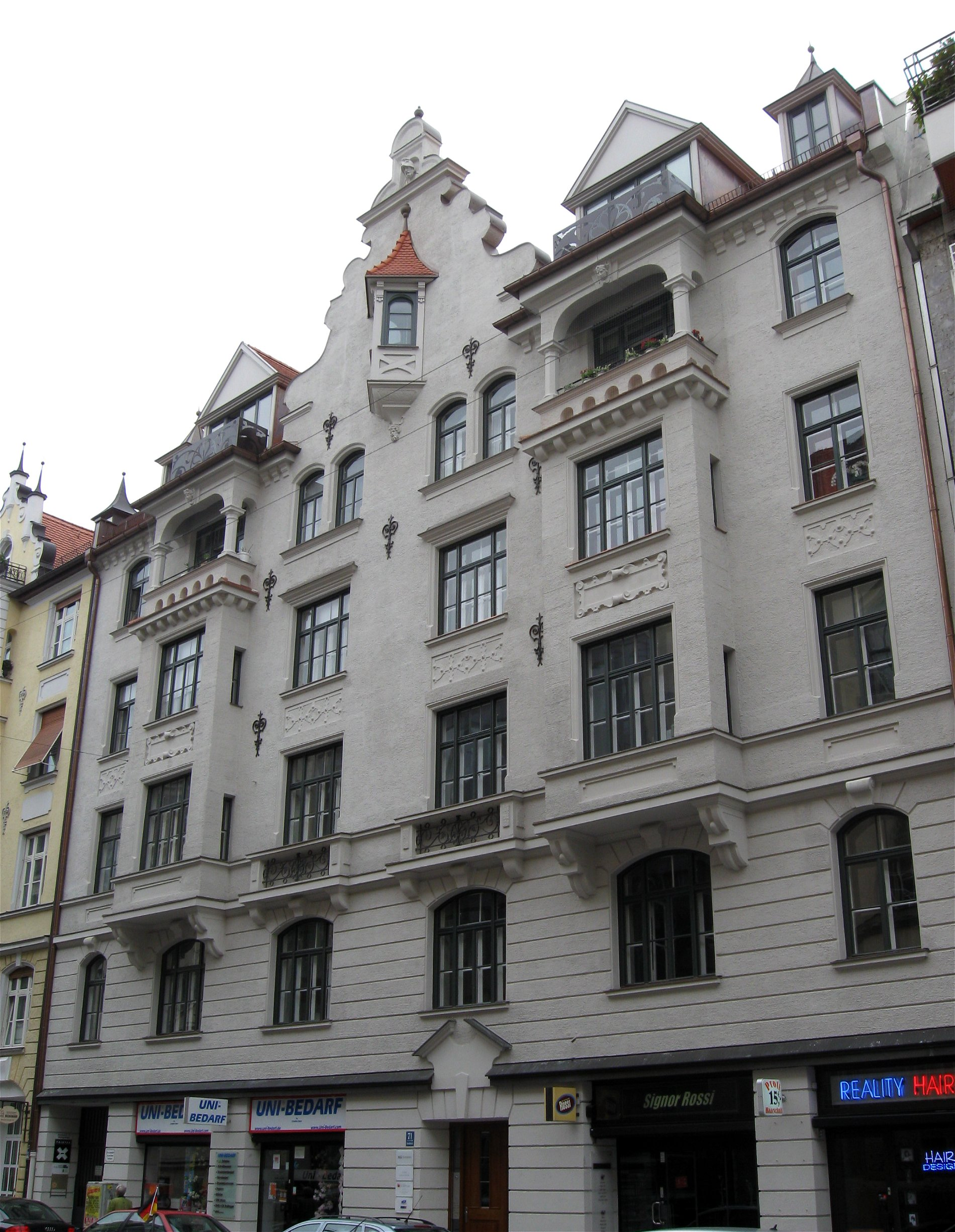 Amalienstraße 71; Mietshaus, deutsche Renaissance, reich gegliederte Doppelerkerfront, um 1900.